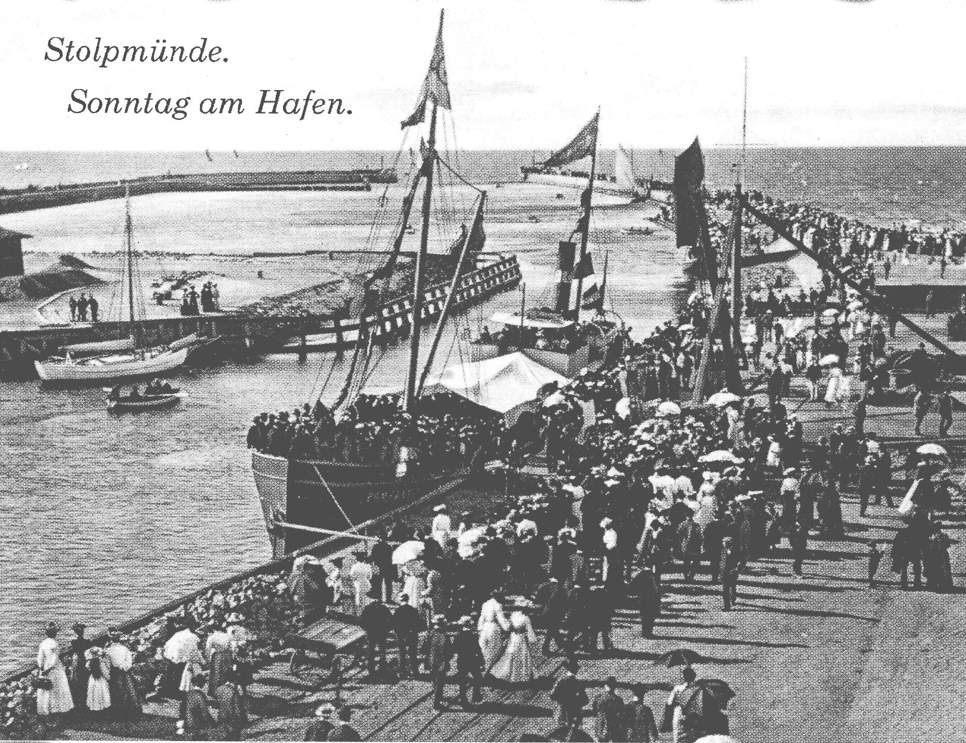 Ustka on old postcard